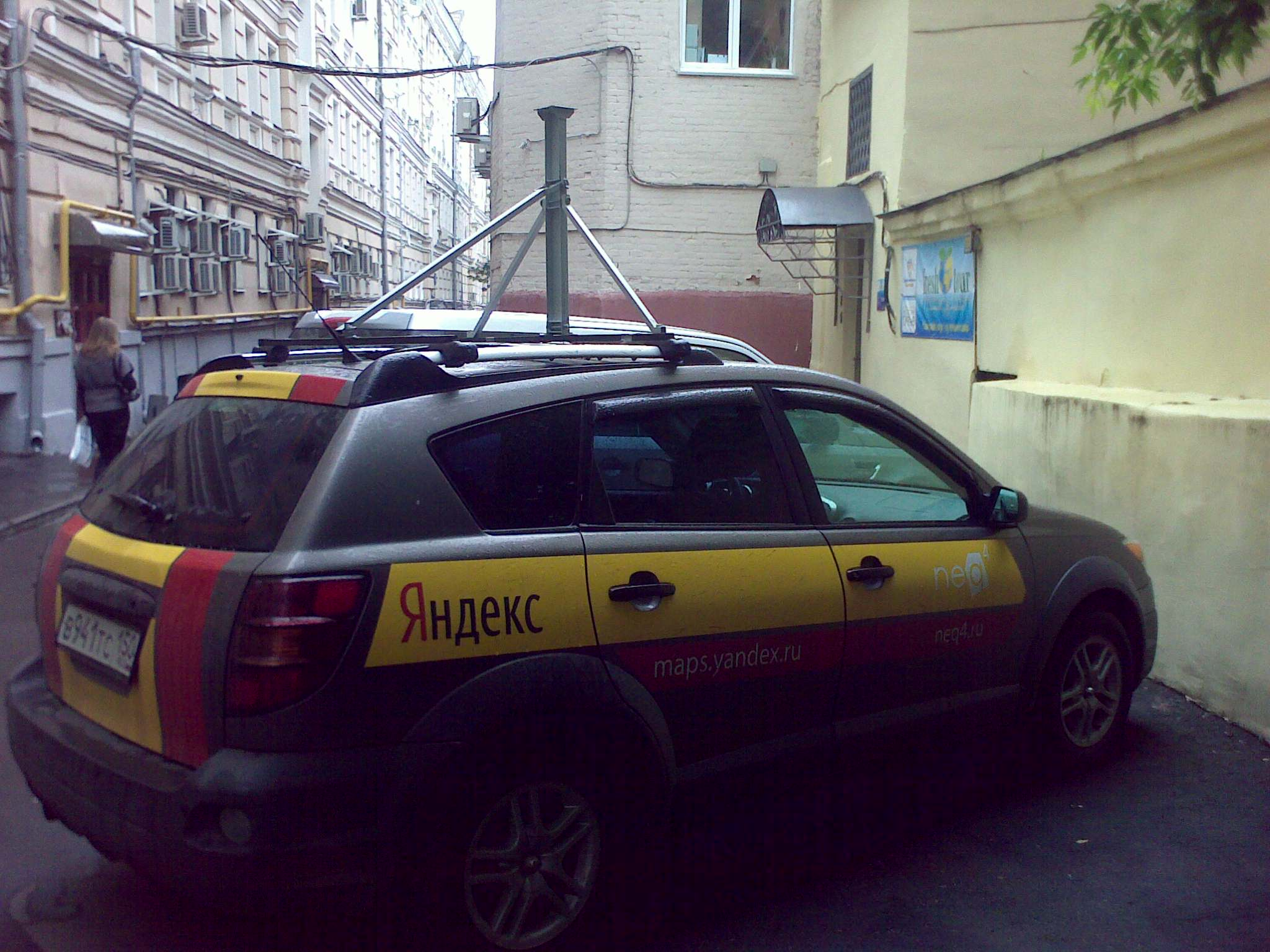 Автомобиль, снимающий панорамы для Яндекса